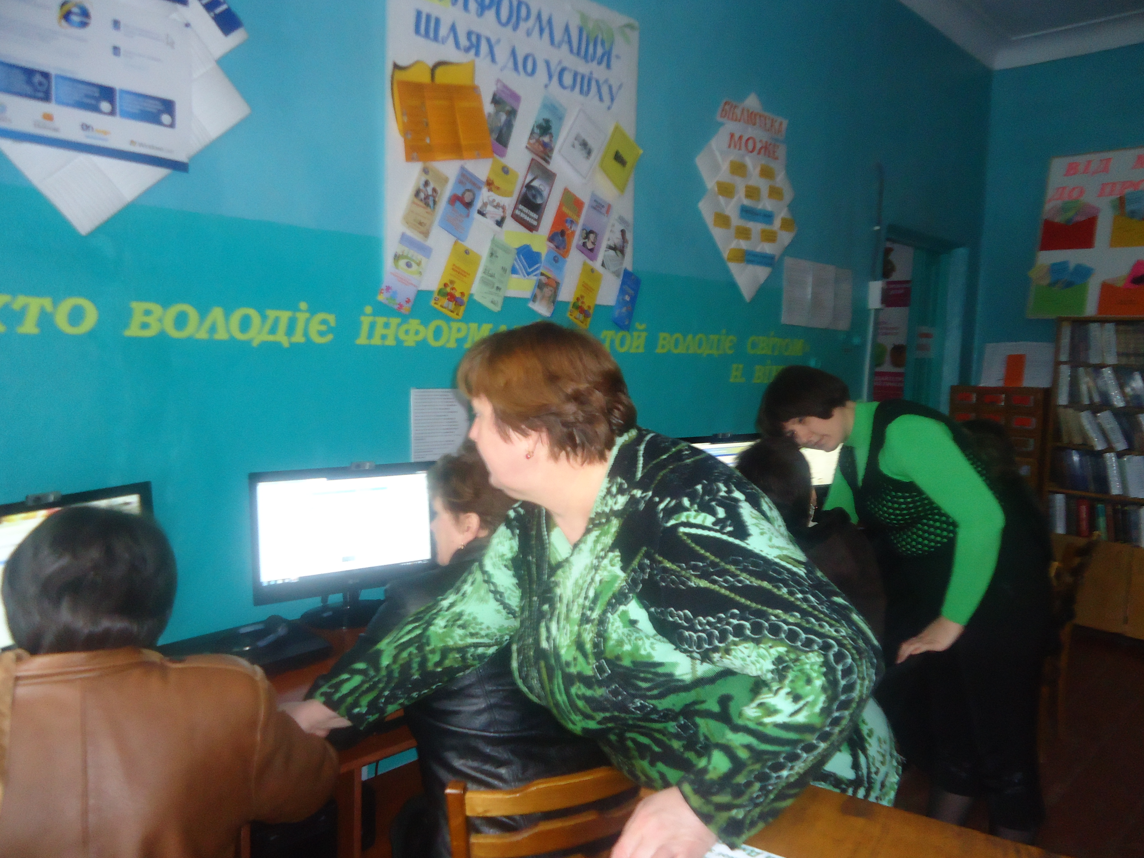 Заняття для бібліотек системи